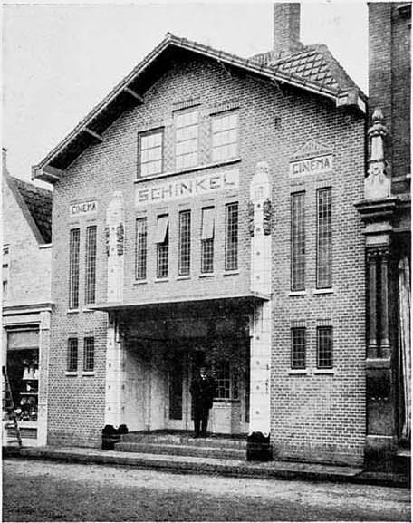 Cinema / Bioscoop Schinkel, Purmerend, the Netherlands / Nederland (architect J.J.P. Oud, 1912). c 1914. Photo. From / afkomstig uit Bouwkundig Weekblad, 34e jaargang, nummer 6 (7 februari 1914): p. 65. De film “Vier vuisten op safari”, Bud Spencer en Terence Hill, op woensdag 14 april 1982, is de laatste film vertoont in deze bioscoop. Na bijna tachtig jaar kwam er een einde aan deze bioscoopgeschiedenis.